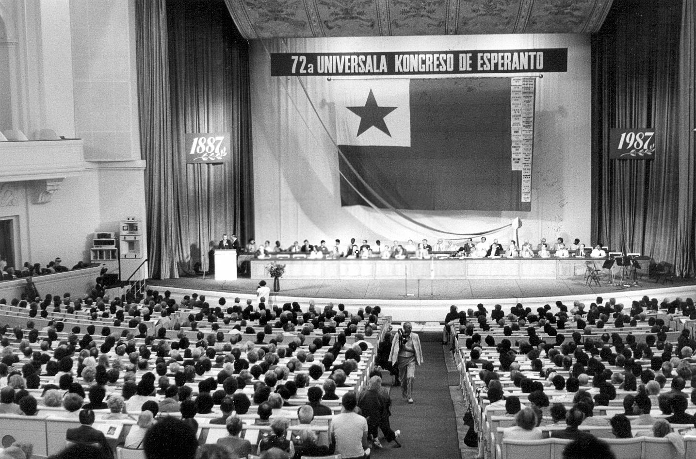 Salono de la Universala Kongreso 1987 en Varsovio